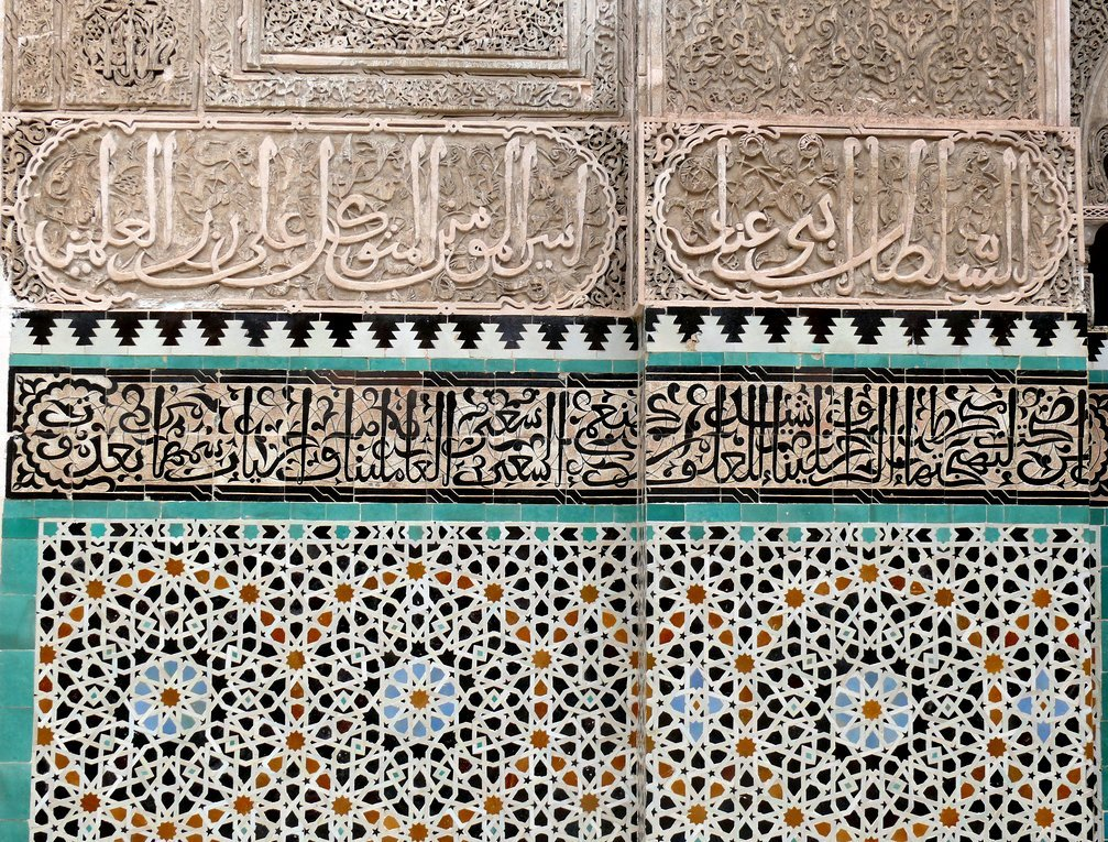 Madrasa Abu Inaniya in Fes (Marokko) Gründungsinschrift (Ausschnitt)